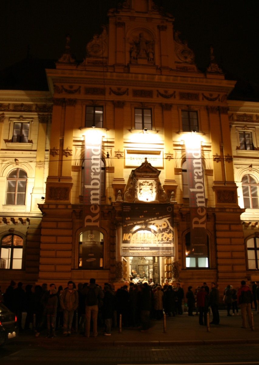 Muzej za umjetnost i obrt snimljen tijekom Noći muzeja